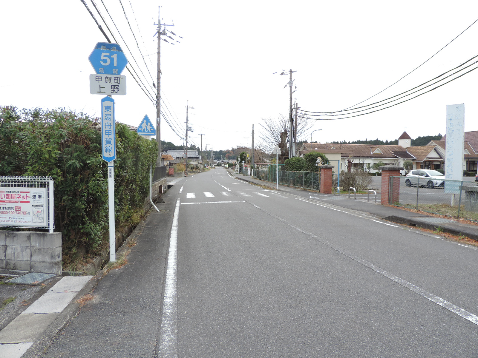 滋賀県甲賀市甲賀町上野の滋賀県道51号東湯舟甲賀線。